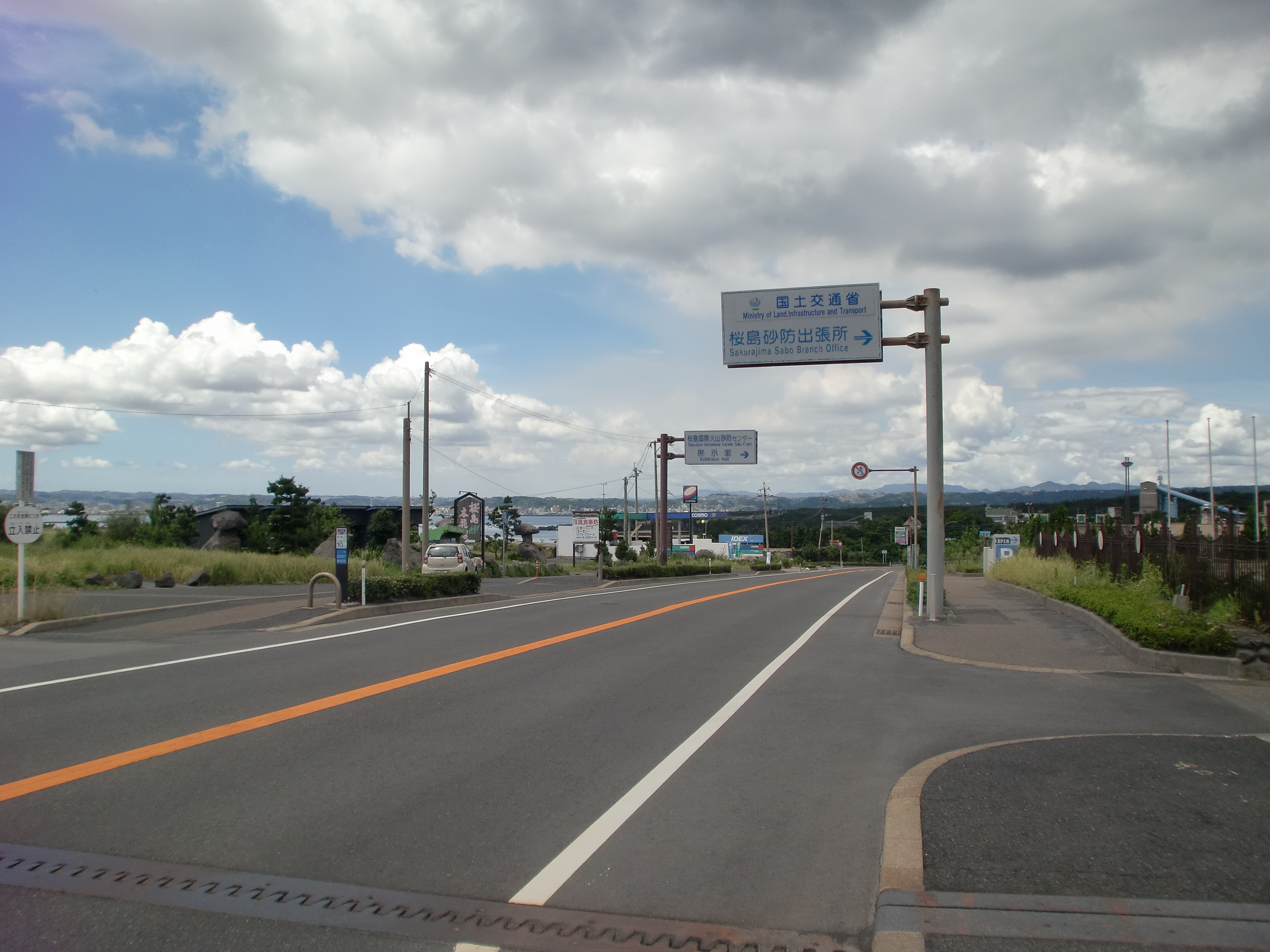 国道224号を野尻町の桜島国際火山砂防センター前から桜島港方面を望む。